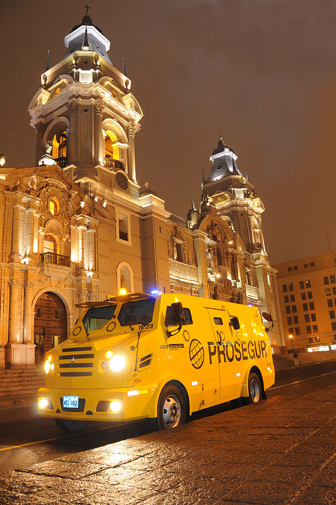 Camión de Prosegur en Perú